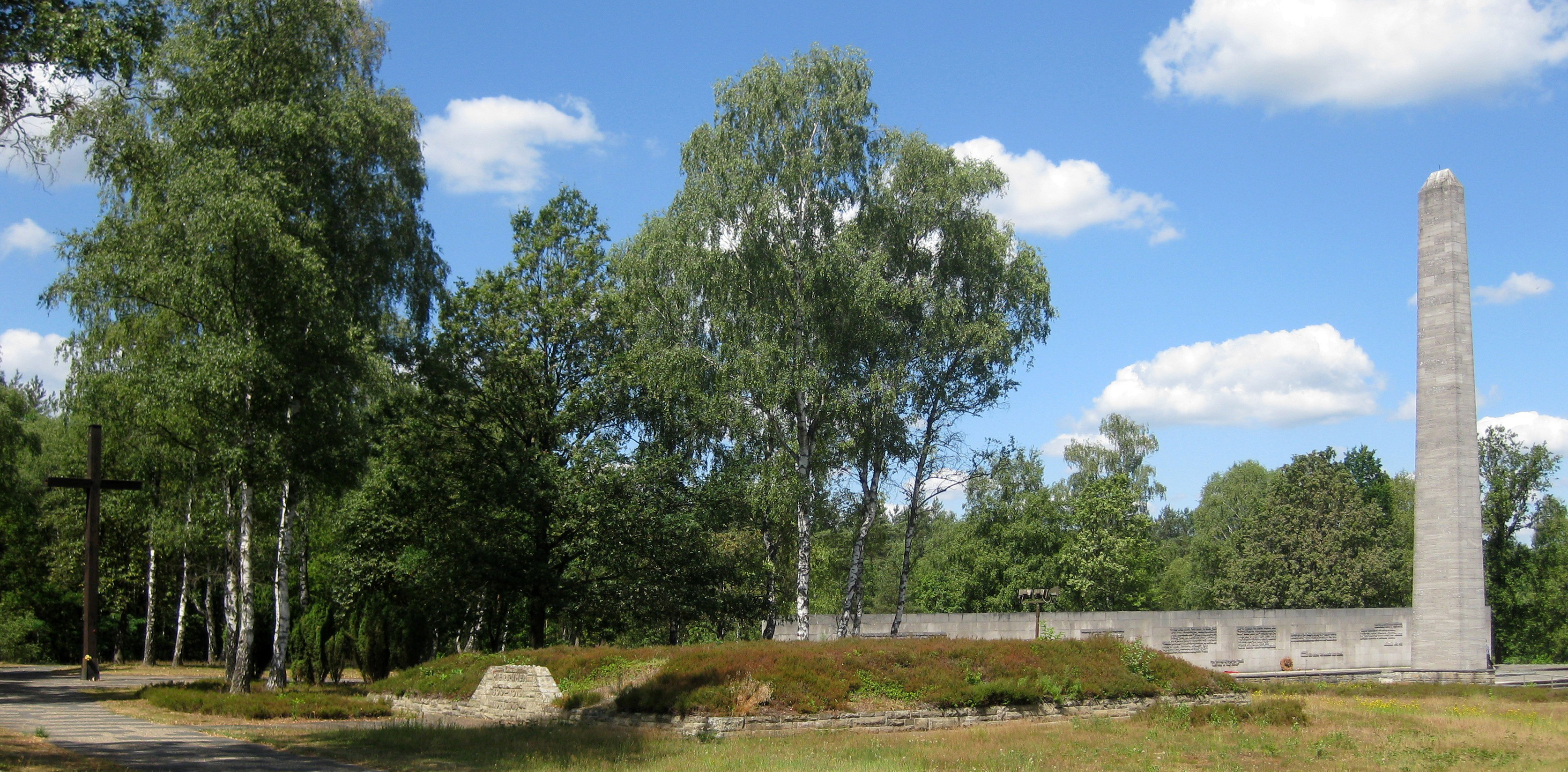 Gedenkstätte Belsen - Überblick (von links) polnisches Kreuz, Massengrab/800 Tote, Obelisk/Inschriftenwand